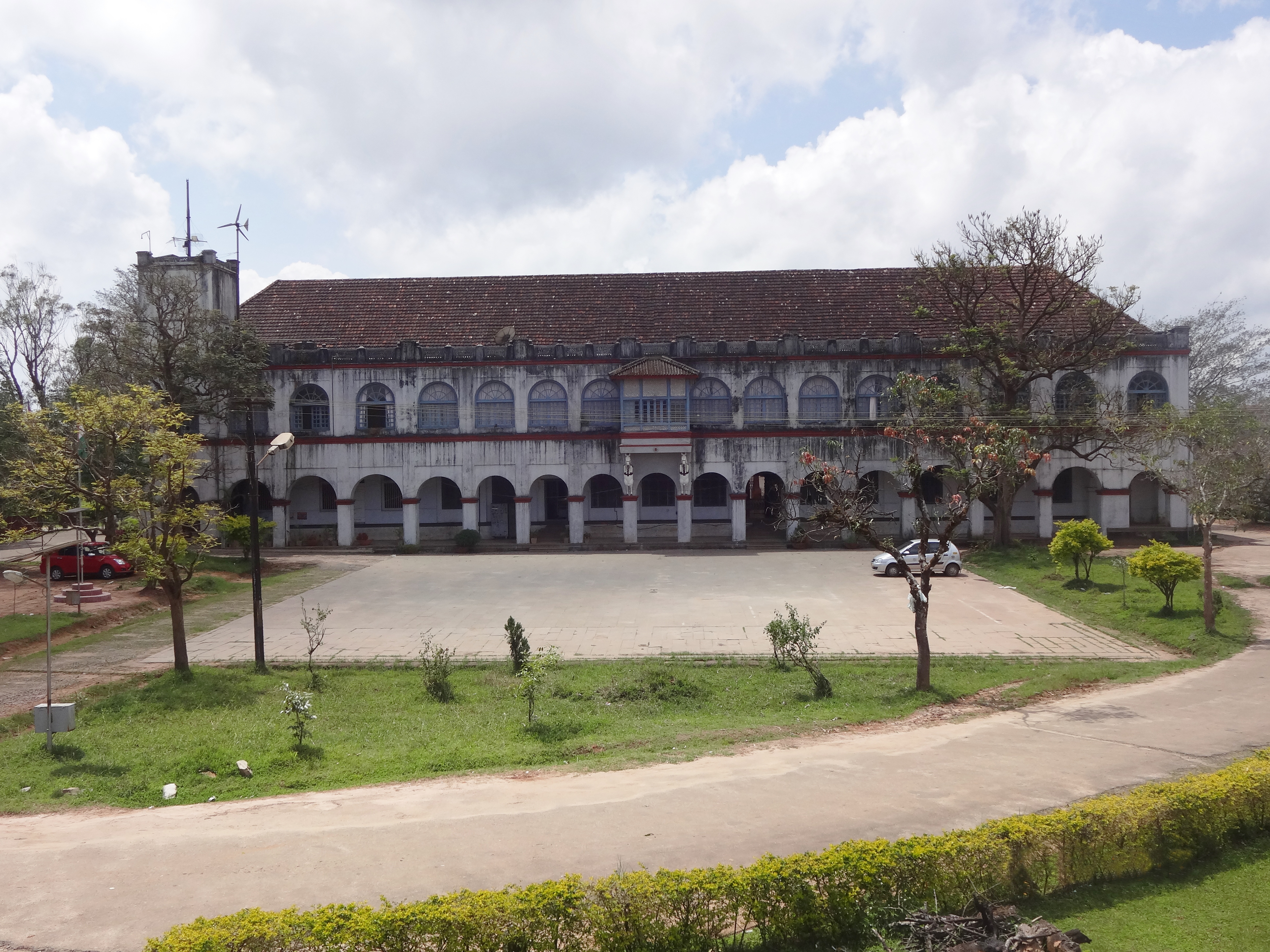 ಕನ್ನಡ: ಮಡಿಕೇರಿ ಅರಮನೆ